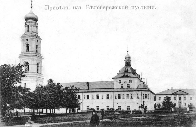 "Старый" собор и колокольня Белобережской пустыни (со старинной открытки)